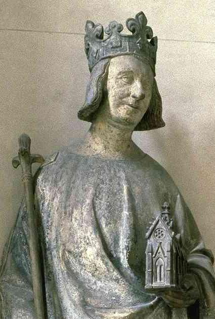 eigen foto